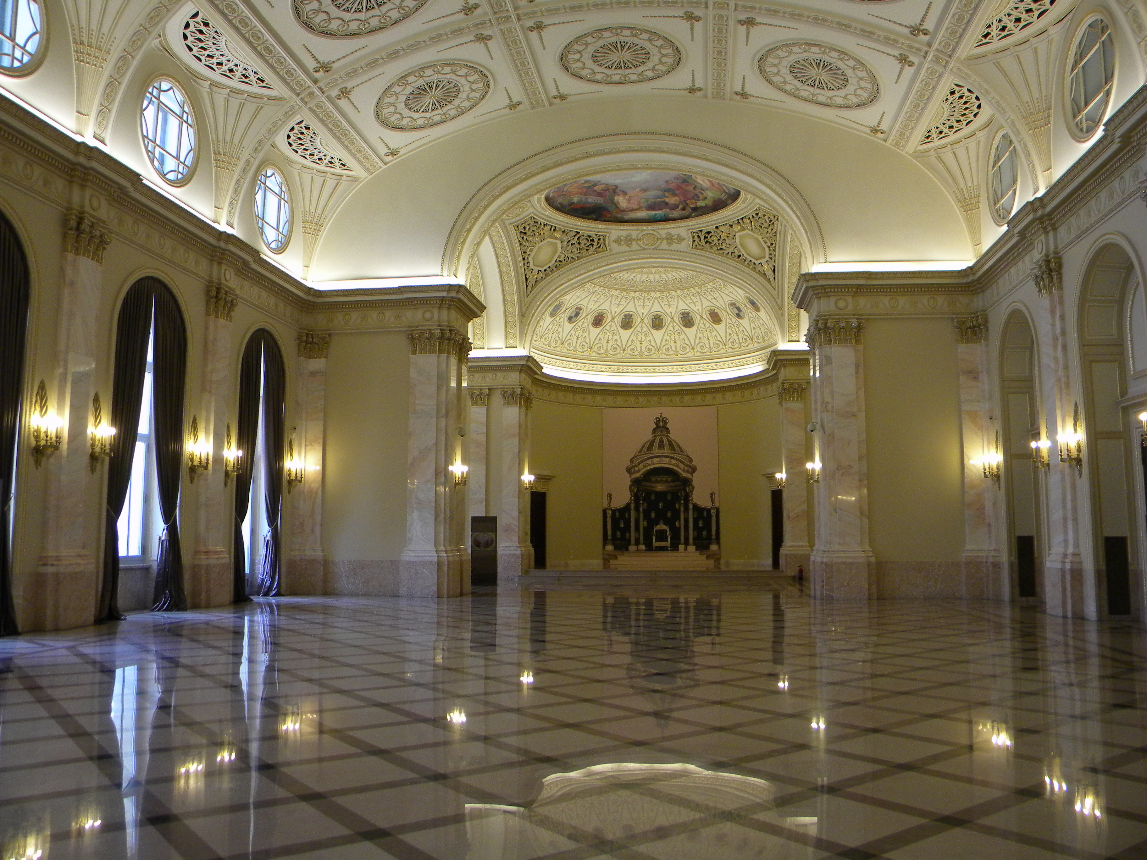 Bucuresti, Romania, Palatul Regal (Muzeul National de Arta al Romaniei - Pavilionul Sala Tronului - Sala Tronului - 2 ); B-II-m-A-19856